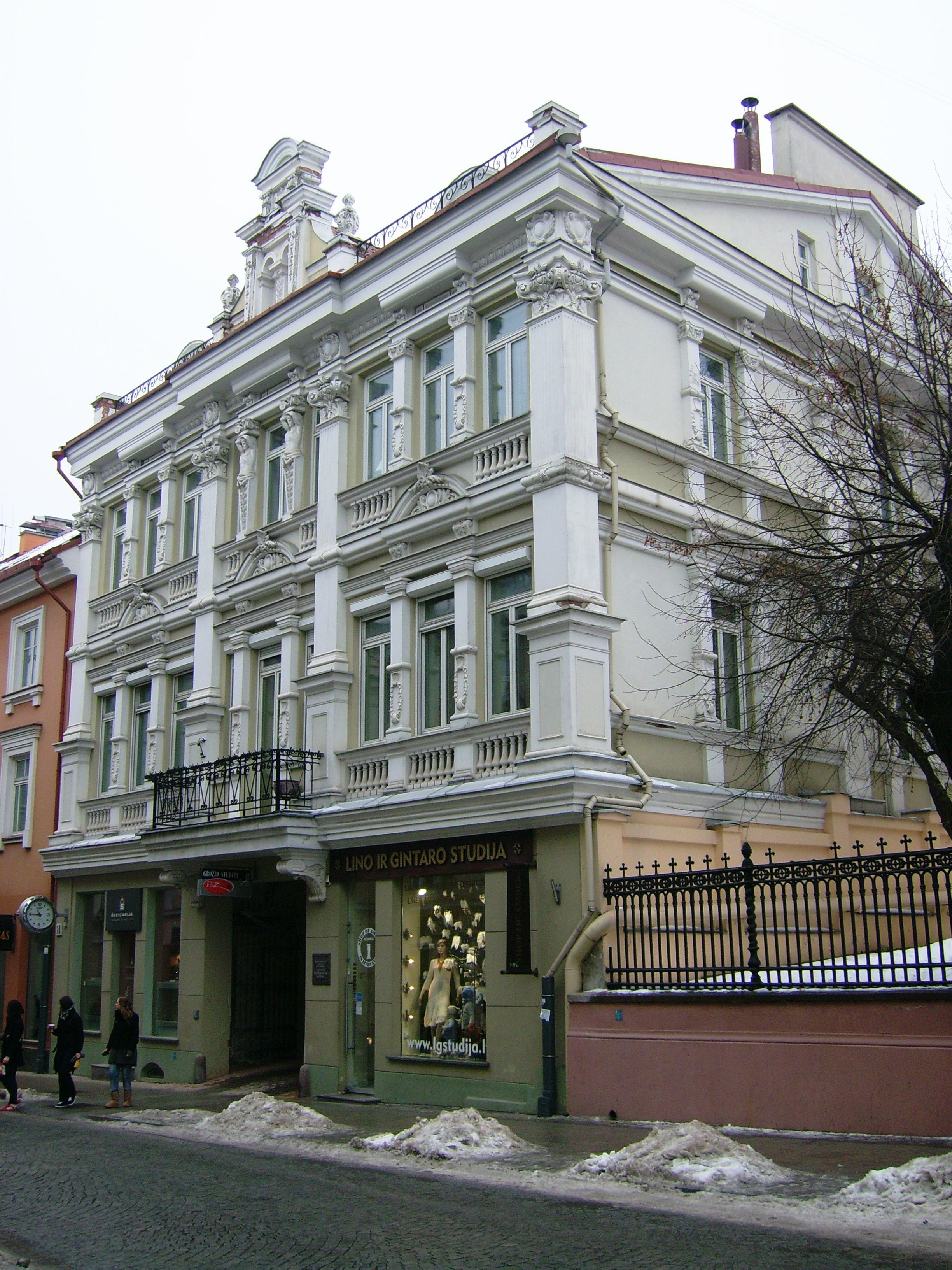 Pirmoji Vilniaus klinika